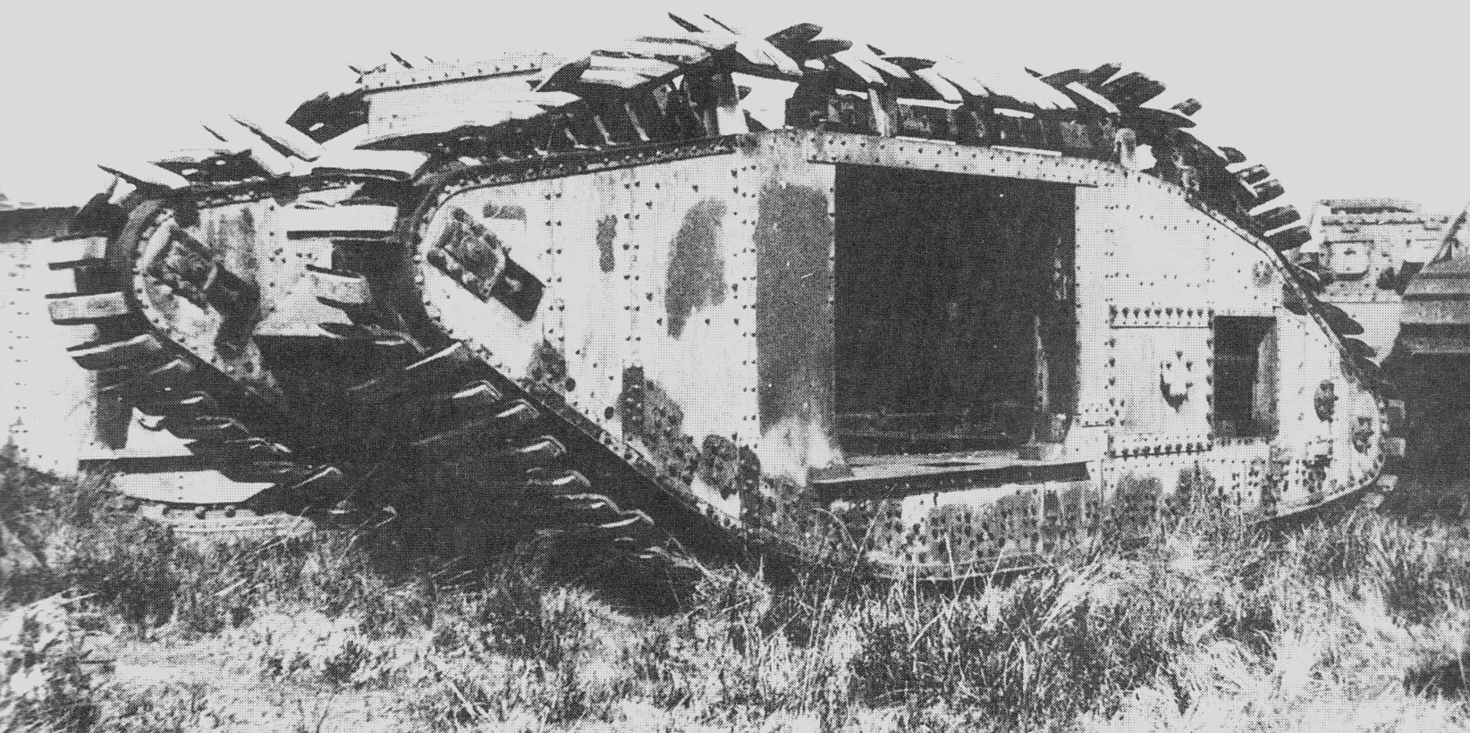 Digitale reproductie foto Mark V tank met snake track.